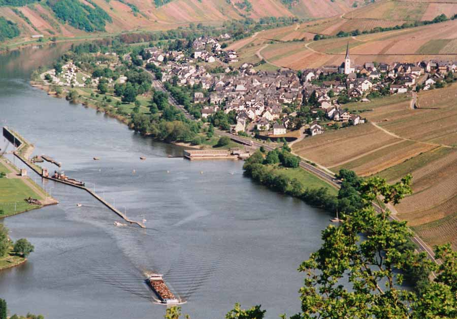 Gemeinde Enkirch angesehen von Starkenburg